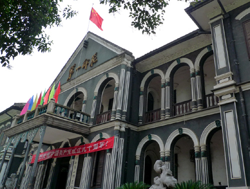 毛泽东母校——湖南第一师范学院